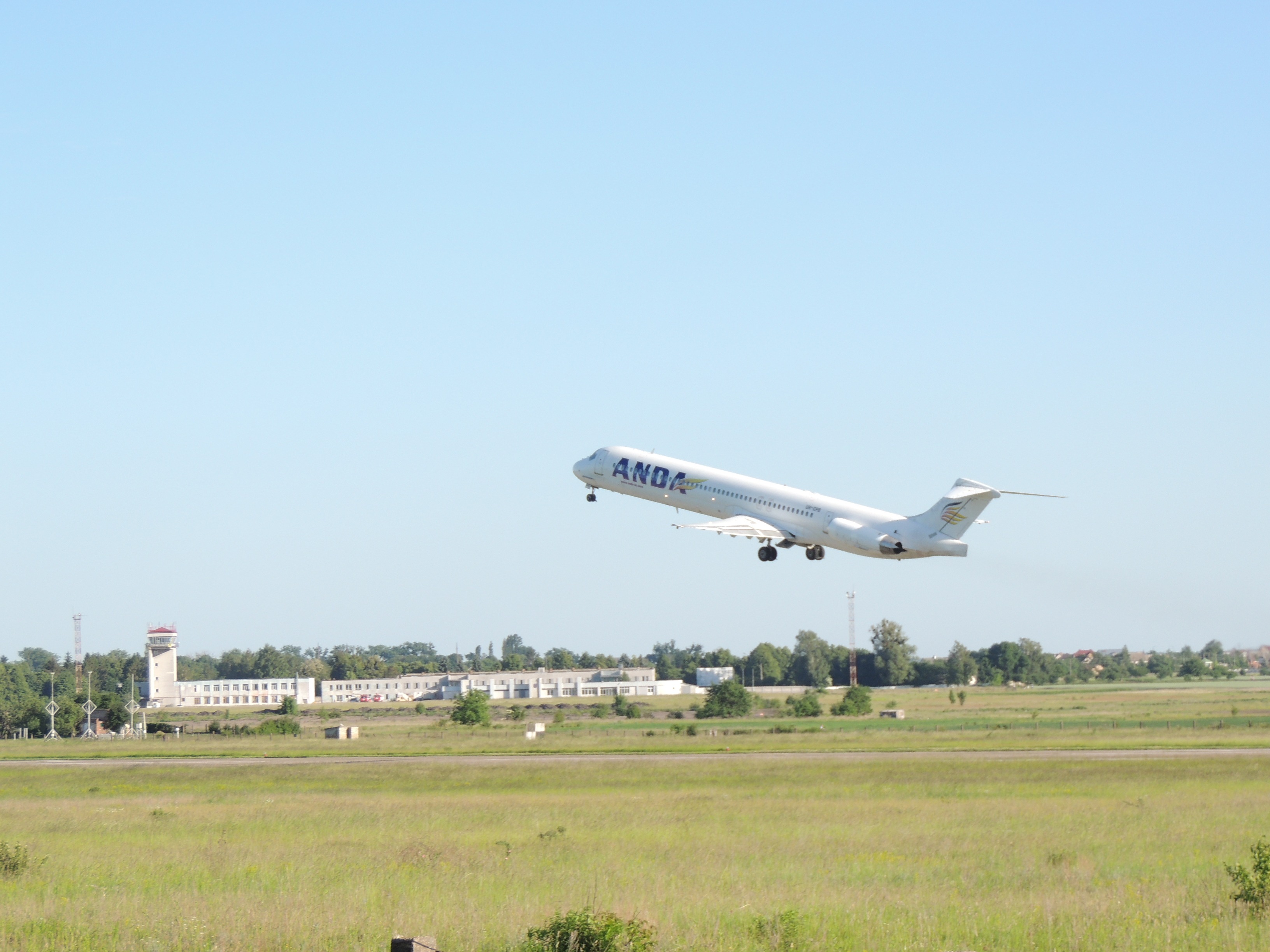 Чартер Рівне-Анталія. Вид на термінал міжнародного Аеропорту "Рівне"